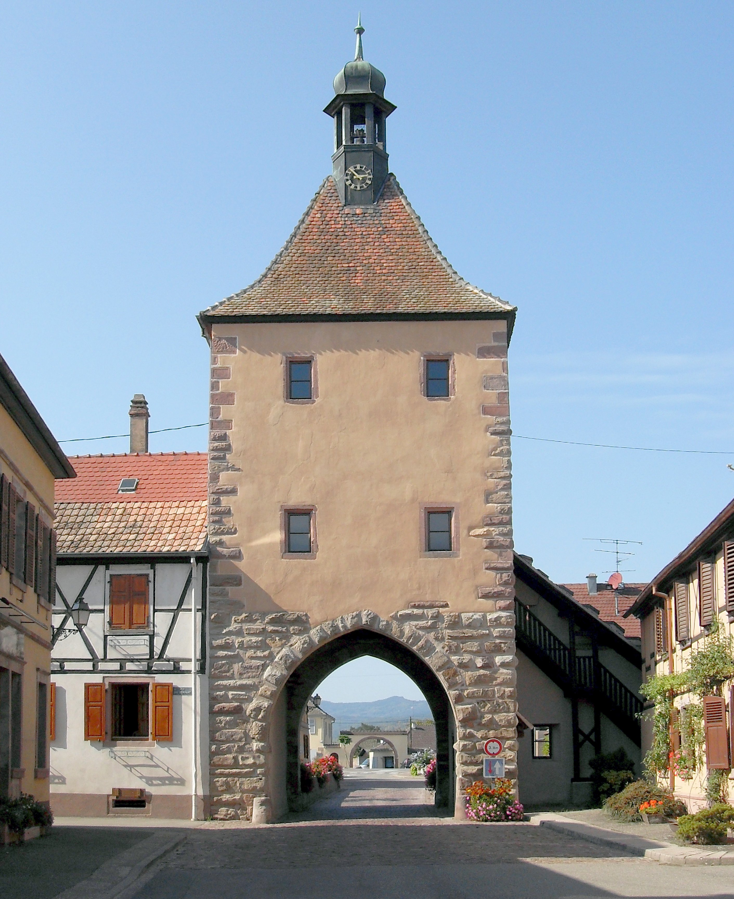 La Porte Haute de Guémar, côté sud-est